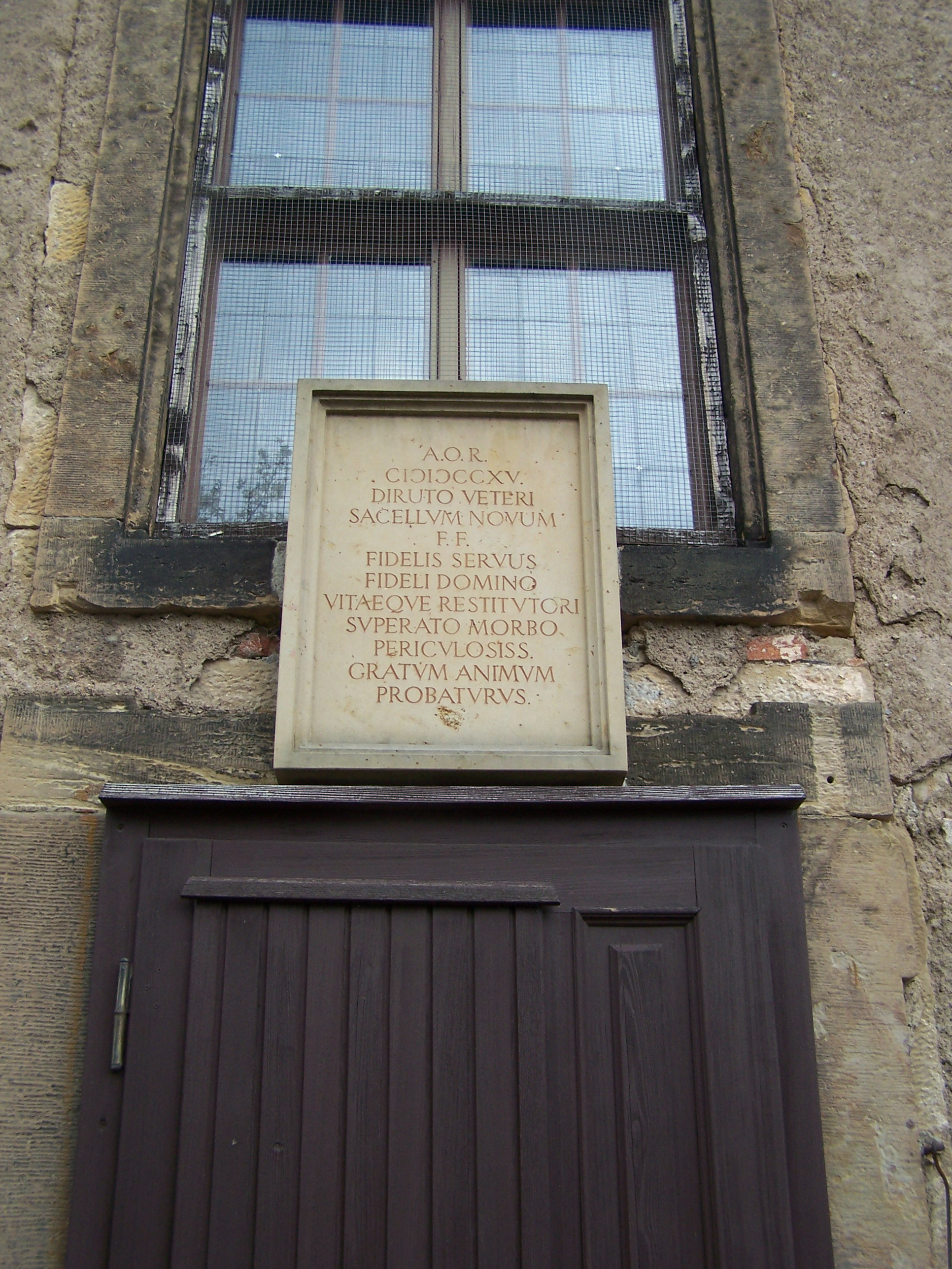 An der Westfassade wurde diese (erneuerte?) Tafel angebracht.